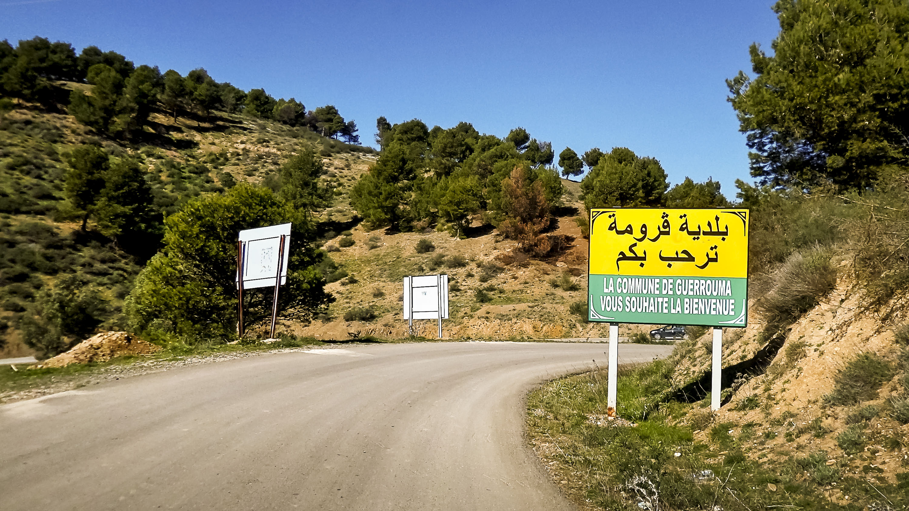 Commune de Guerrouma, wilaya de Bouira بلدية قرومة، ولاية البويرة